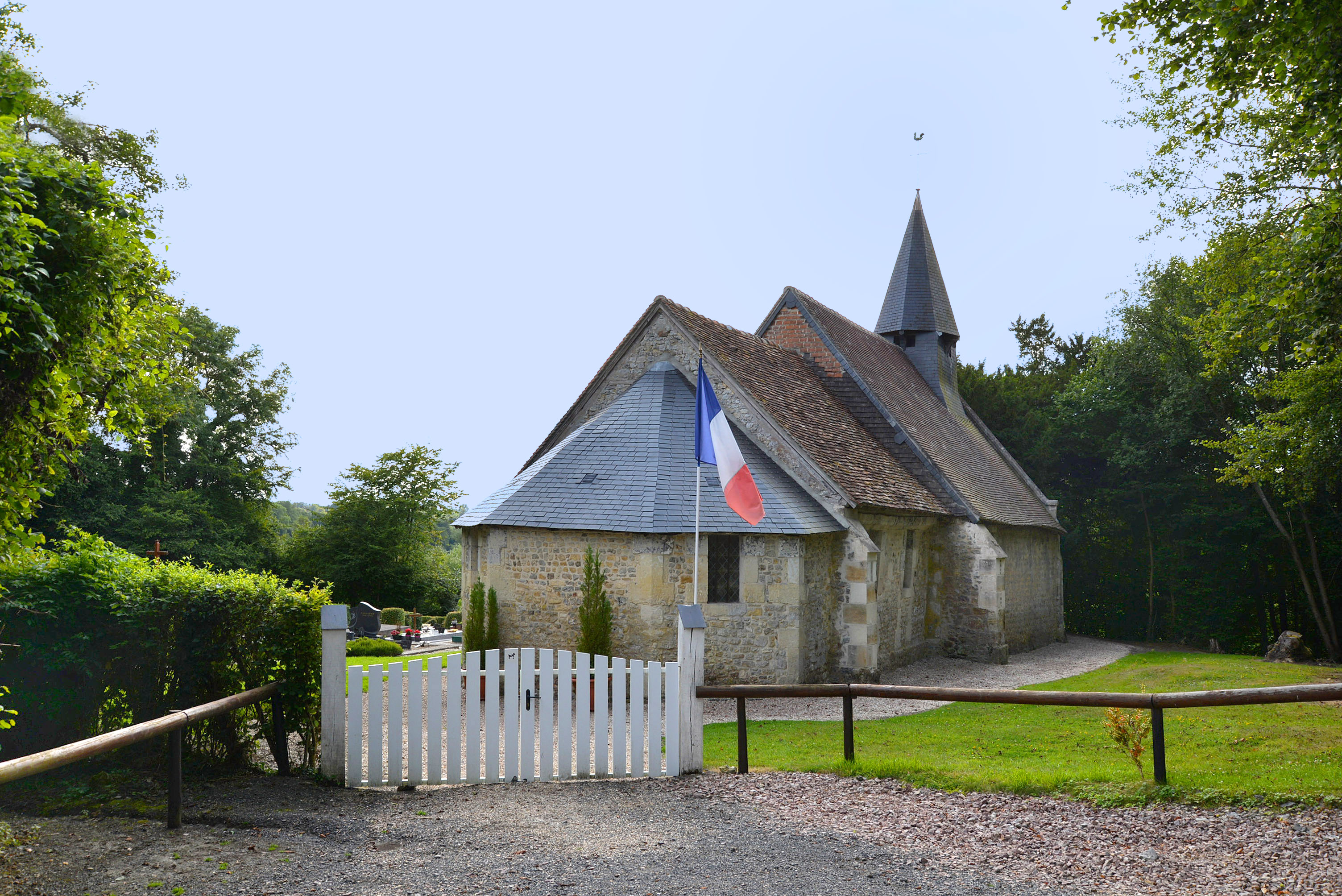 Le Fournet (Calvados)